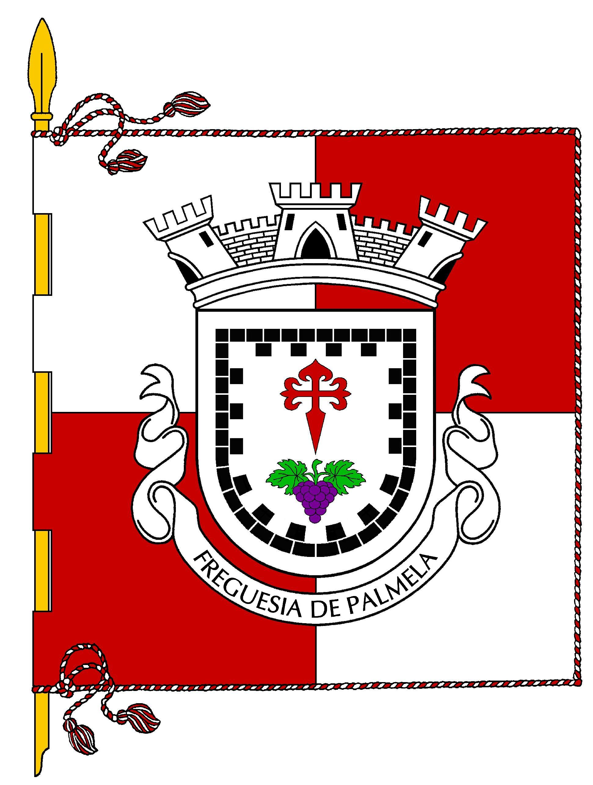 bandeira